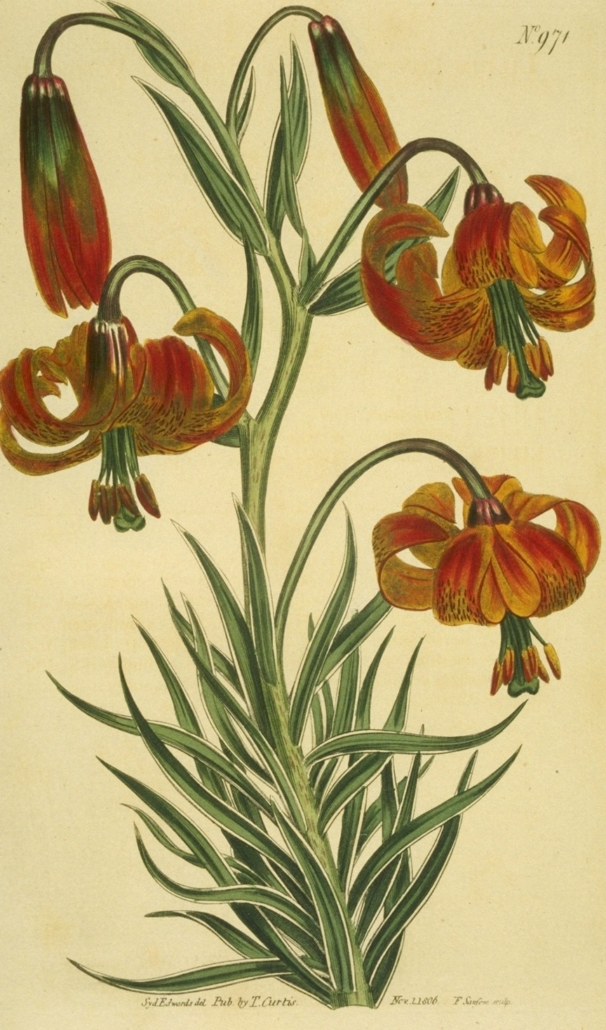 Seealpenlilie - Lilium pomponium